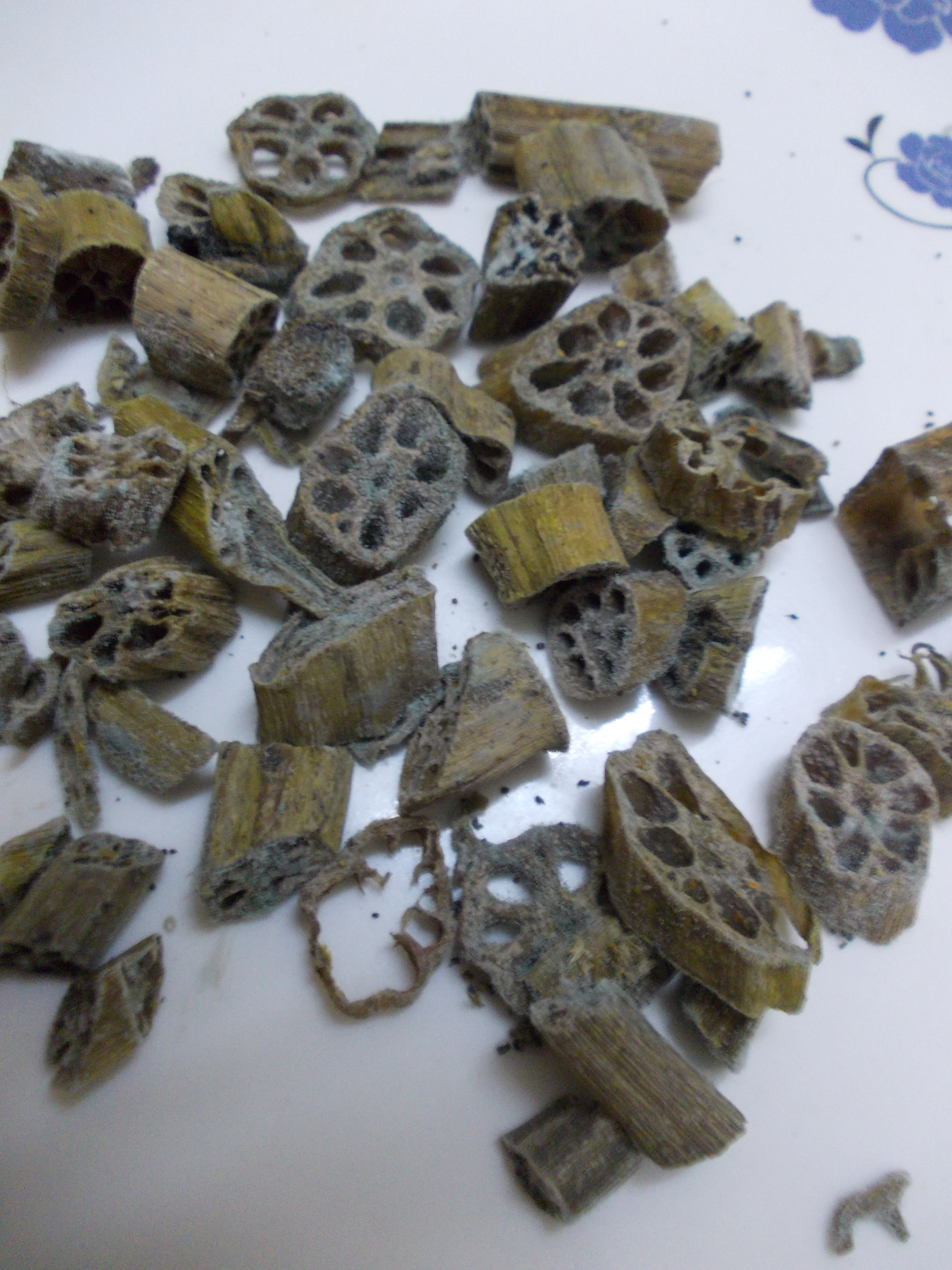 താമരക്കിഴങ്ങ്